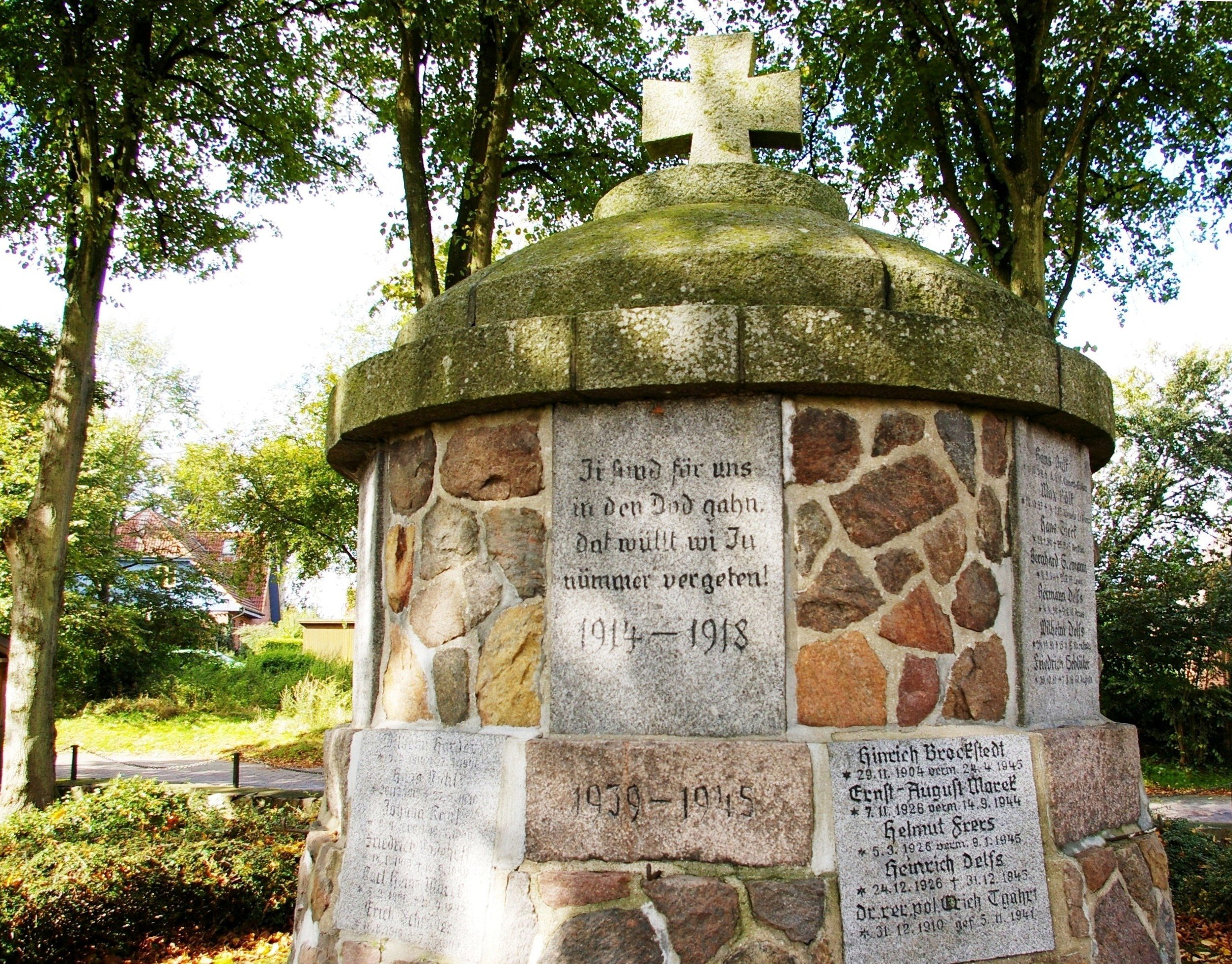 Widmungsinschrift niederdeutsch: "Ji sund för uns / in den Dod gahn. / dat wüllt wi Ju / nümmer vergeten! / 1914-1918 / 1939 -1945"